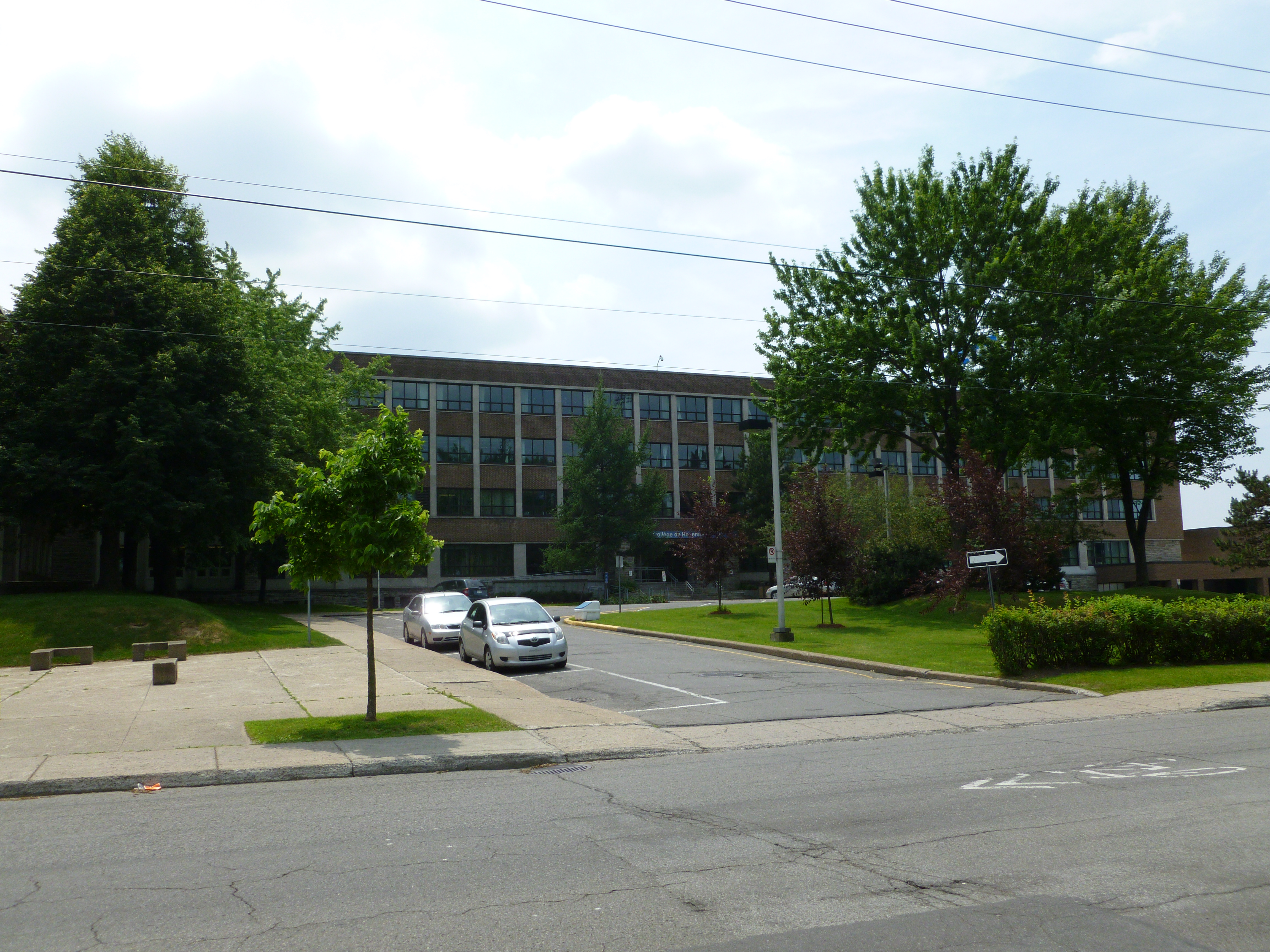 Collège de Rosemont à Montréal, Québec, Canada